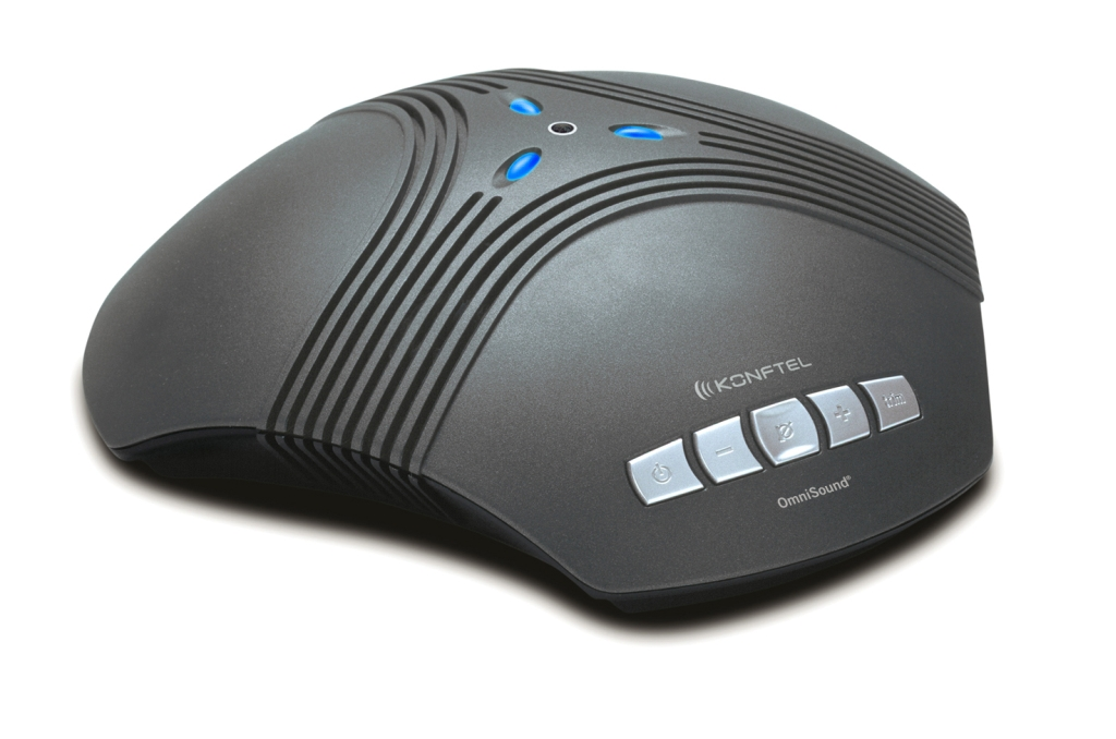 Конференц-приставка Konftel 60W